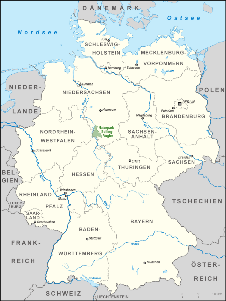 Karte des Naturparks Solling-Vogler in Deutschland